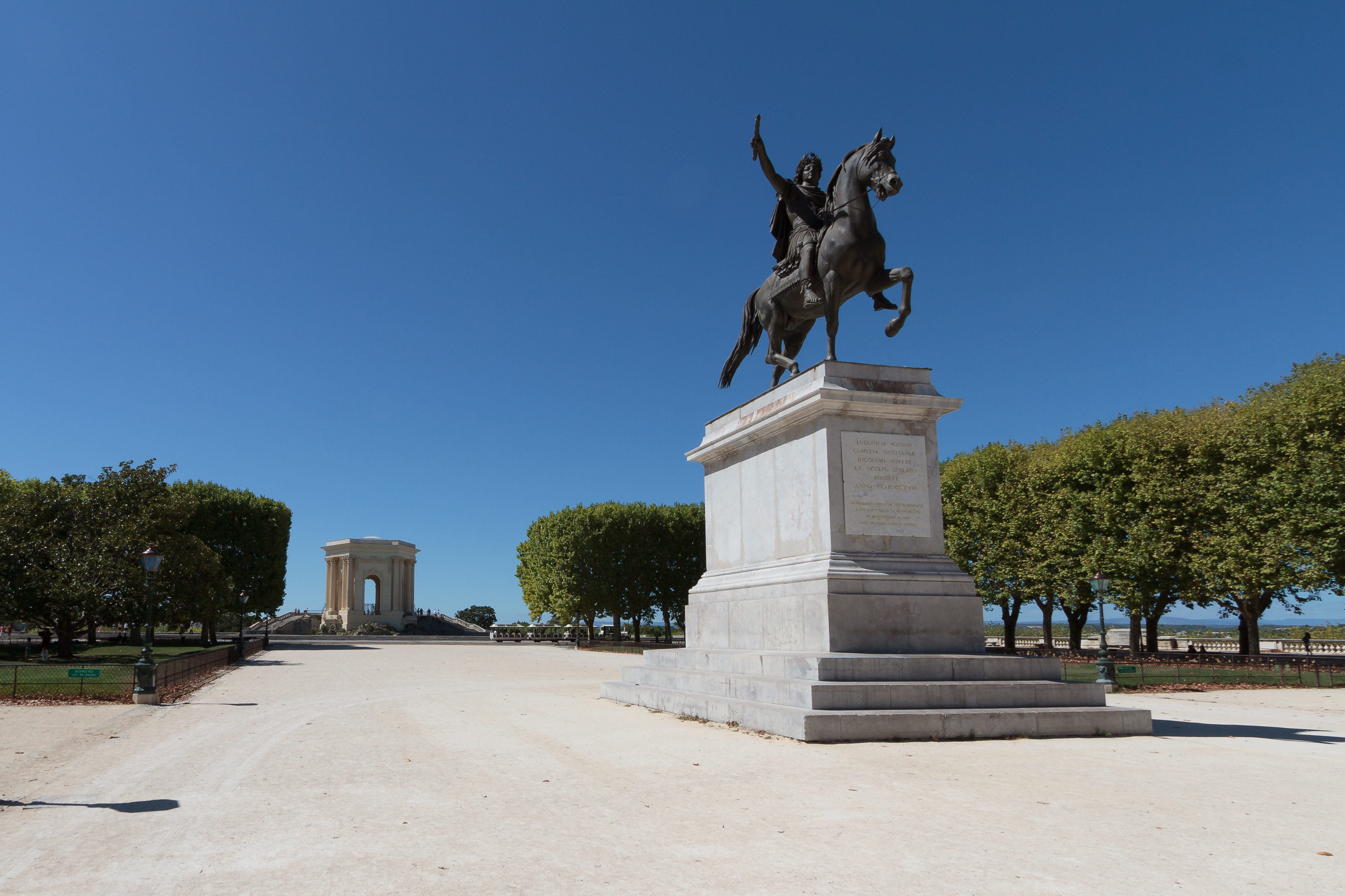 La promenade du Peyrou à Montpellier, France This building is en partie classé, en partie inscrit au titre des Monuments Historiques. It is indexed in the Base Mérimée, a database of architectural heritage maintained by the French Ministry of Culture, under the references PA00103609 and IA34000346 .